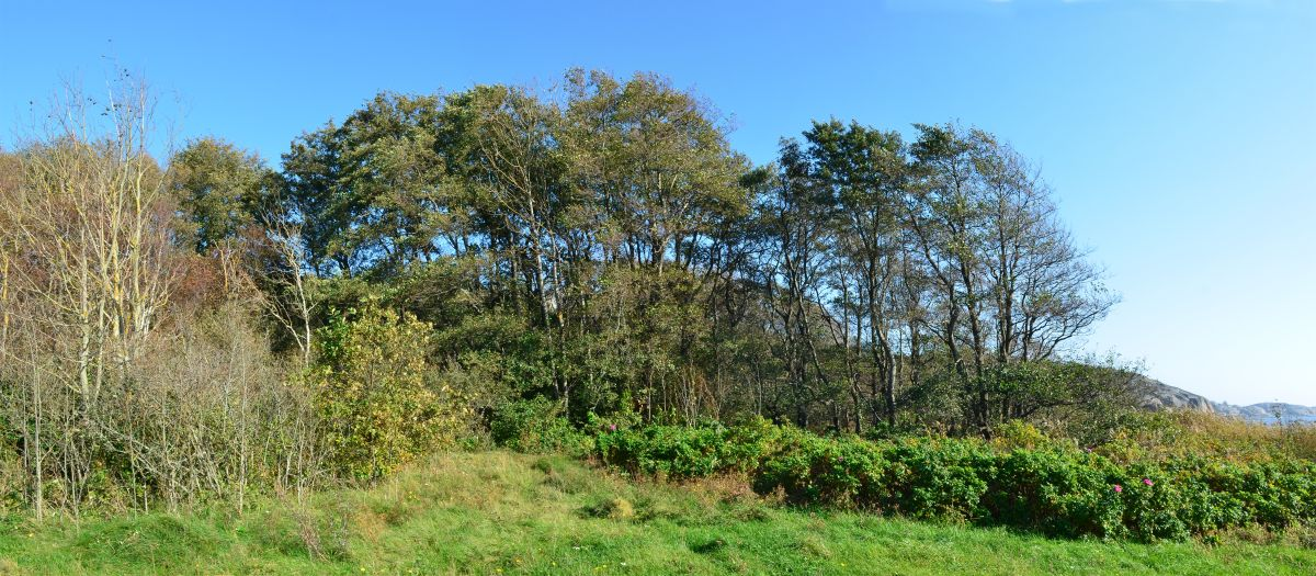 Mellom svartortrærne på bildet, bare noen få meter fra stranden, vokser den sjeldne vasskjeksen.